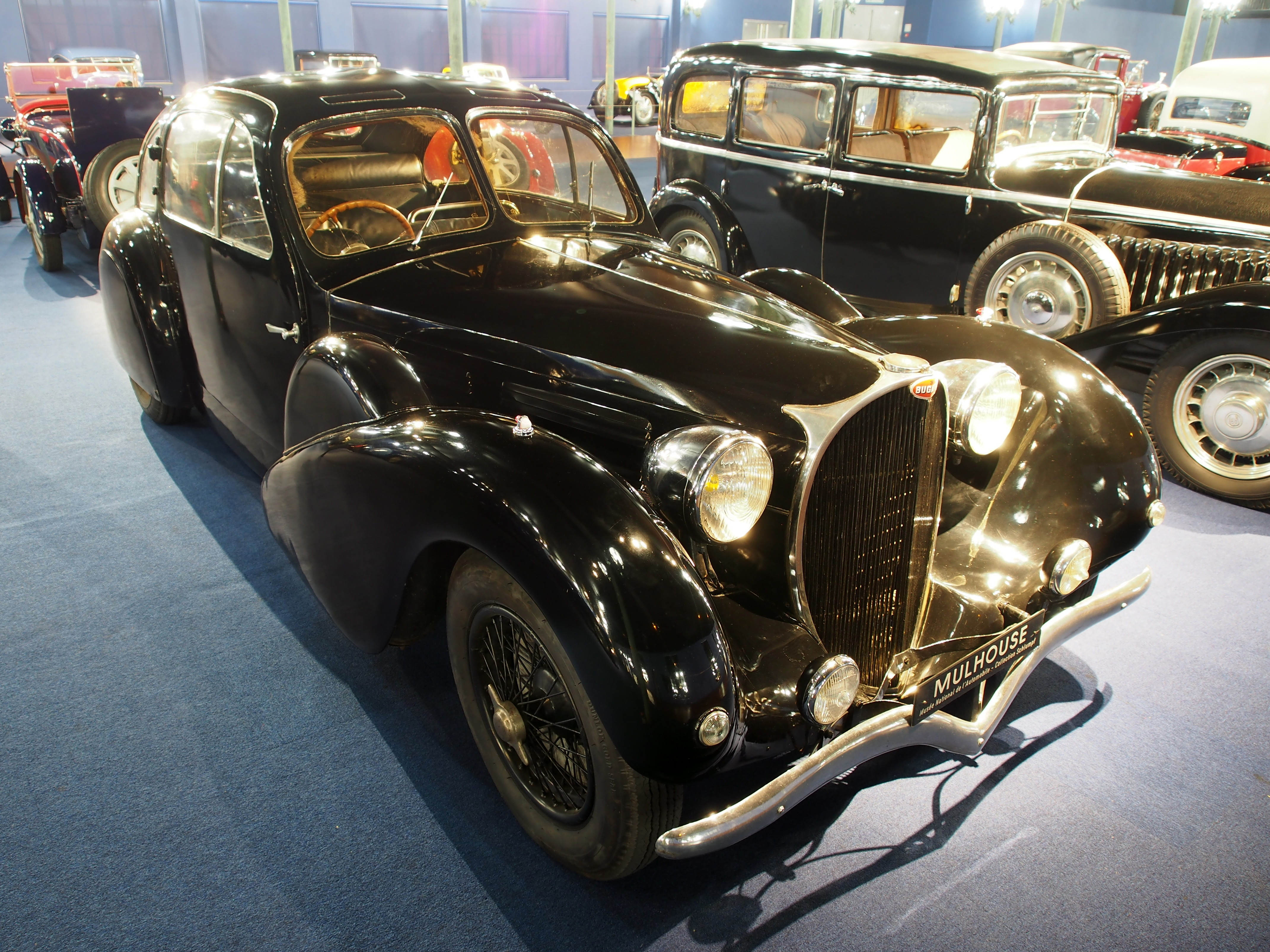 Photographed at Musée National de l'Automobile, France.